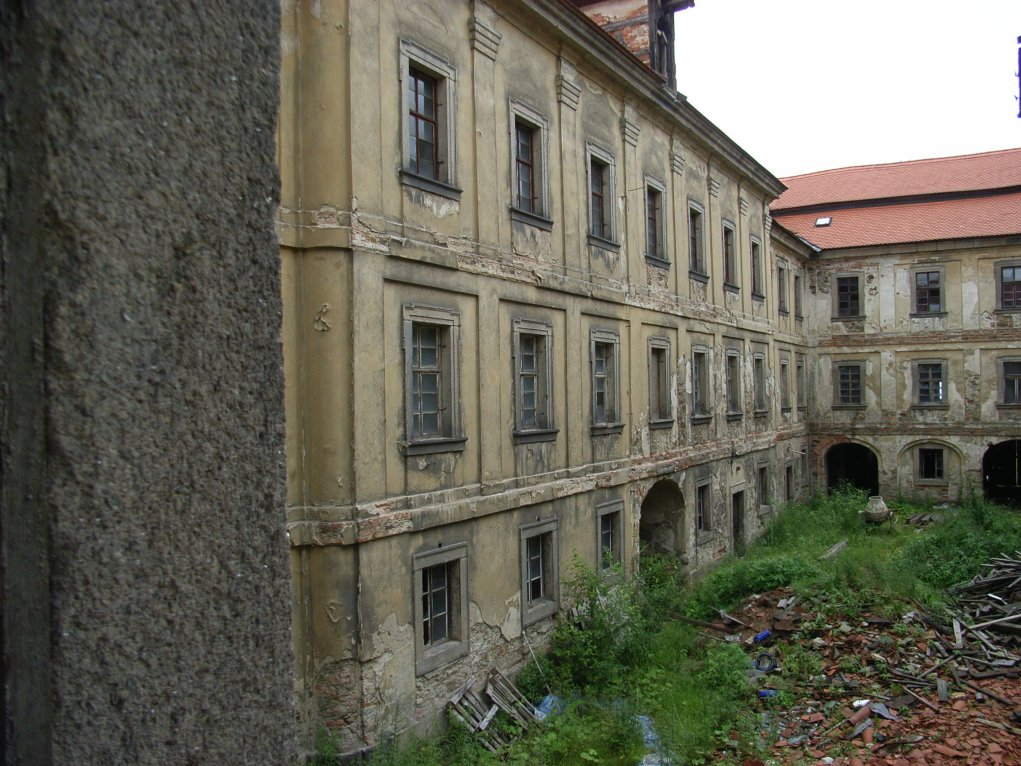 Maria Kulm, Blick in den Innenhof der Kulmer Propstei